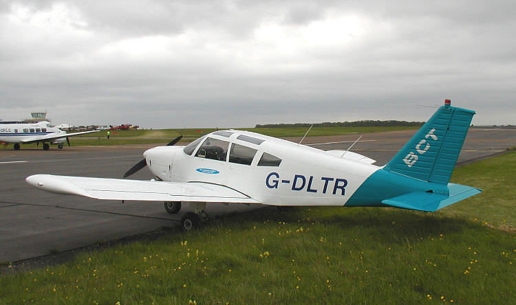 Piper PA-28 Cherokee 180E fotografiado en la Gran Semana de Aviones Antiguos de Kemble, Inglaterra.